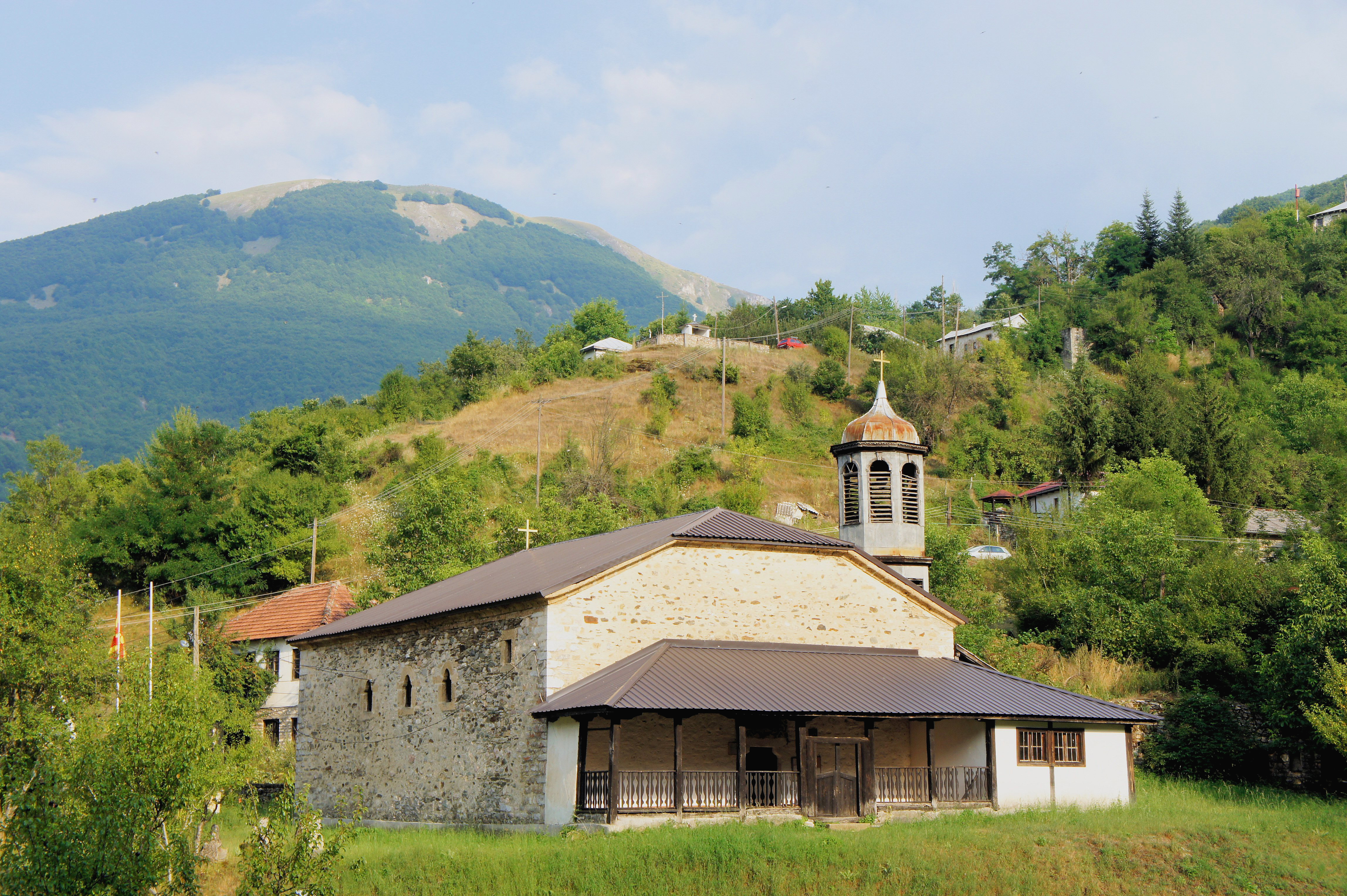 Црквата Свети Петар и Павле - с. Тресонче